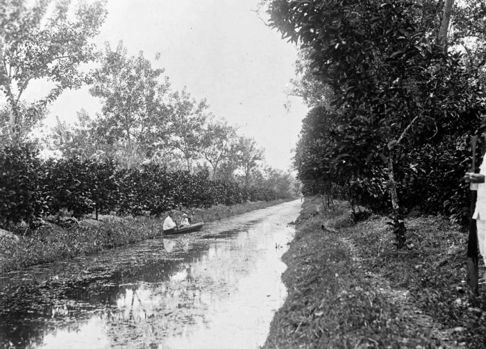 Negatief. Vaartrens op plantage Berlijn met links en rechts Liberia koffievelden